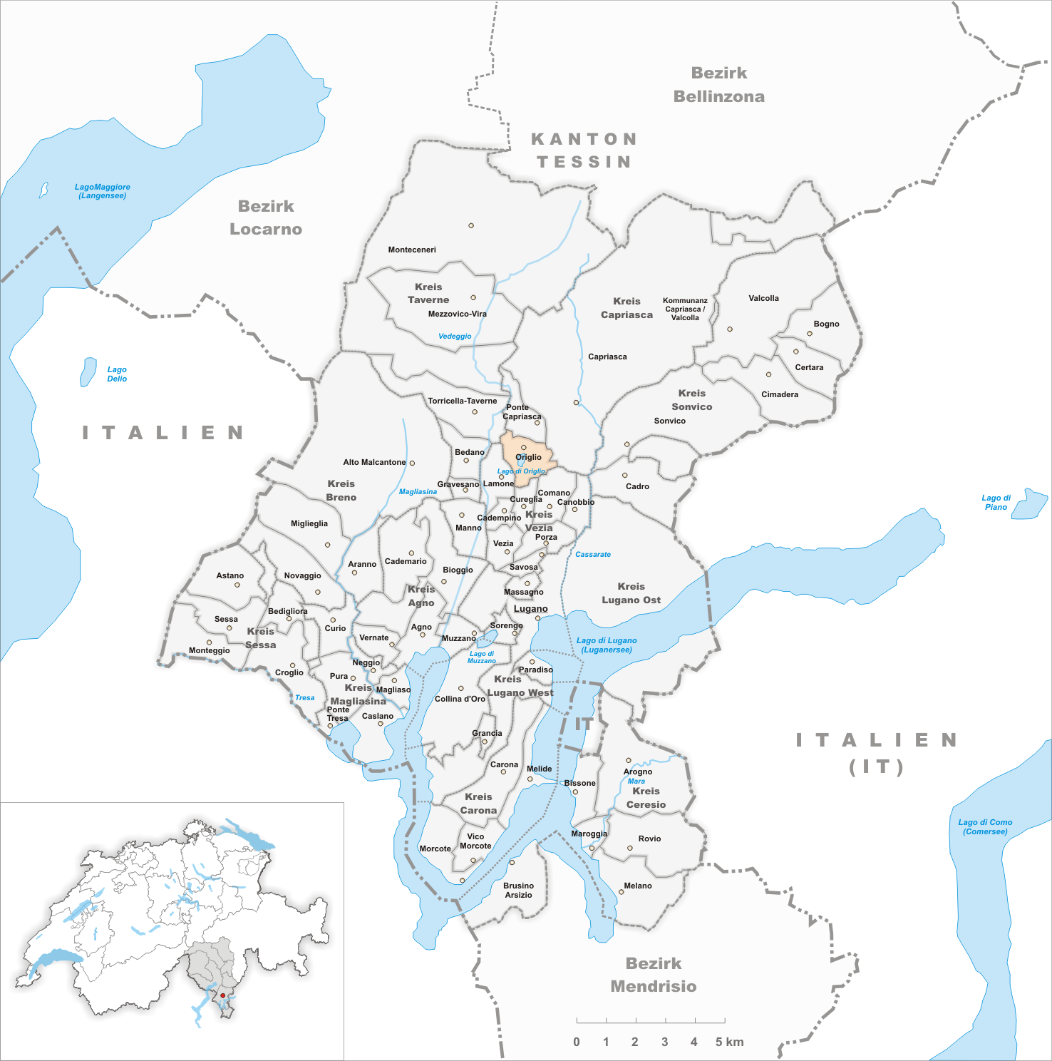 Municipality Origlio